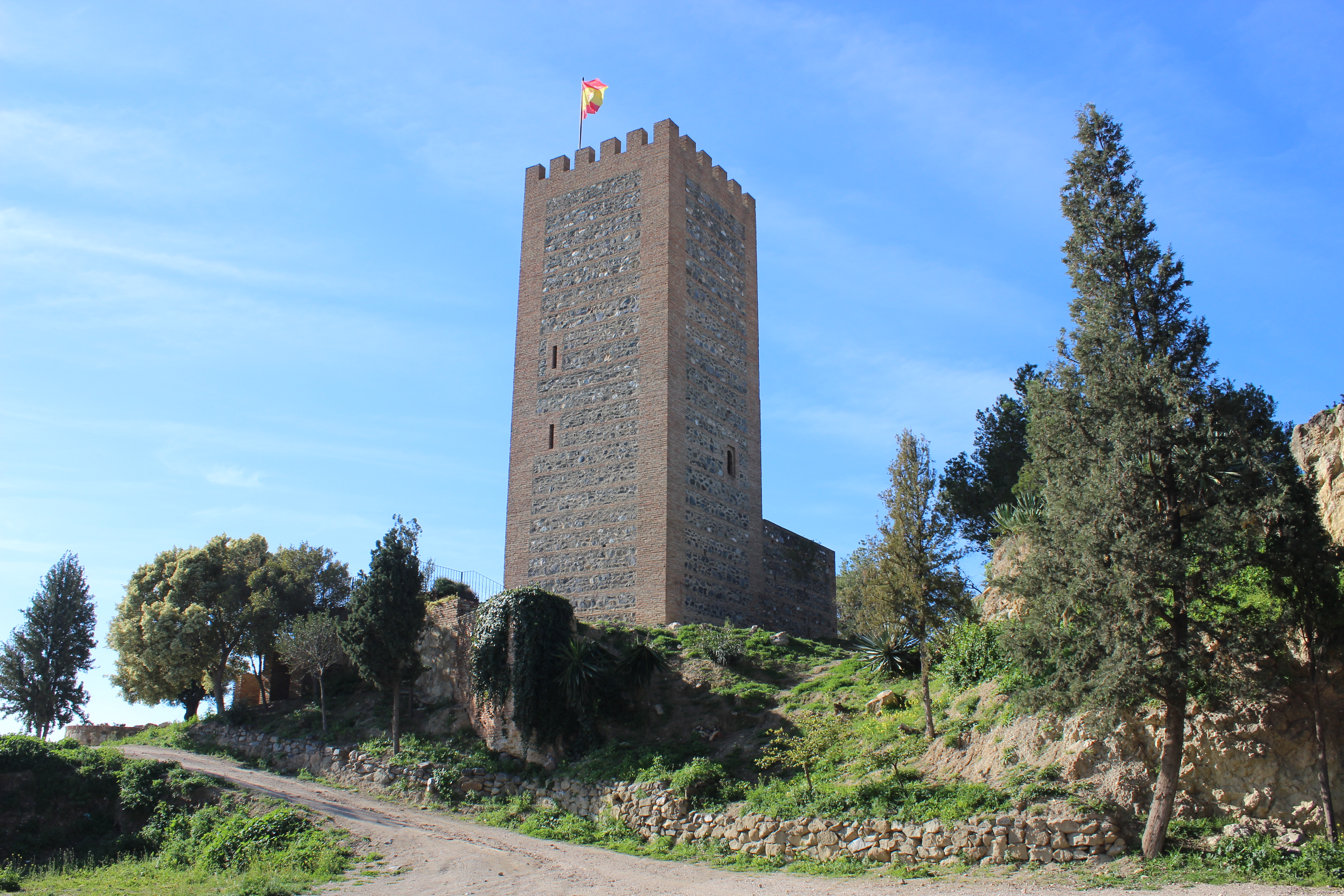 Restos de la fortaleza, año 2015.